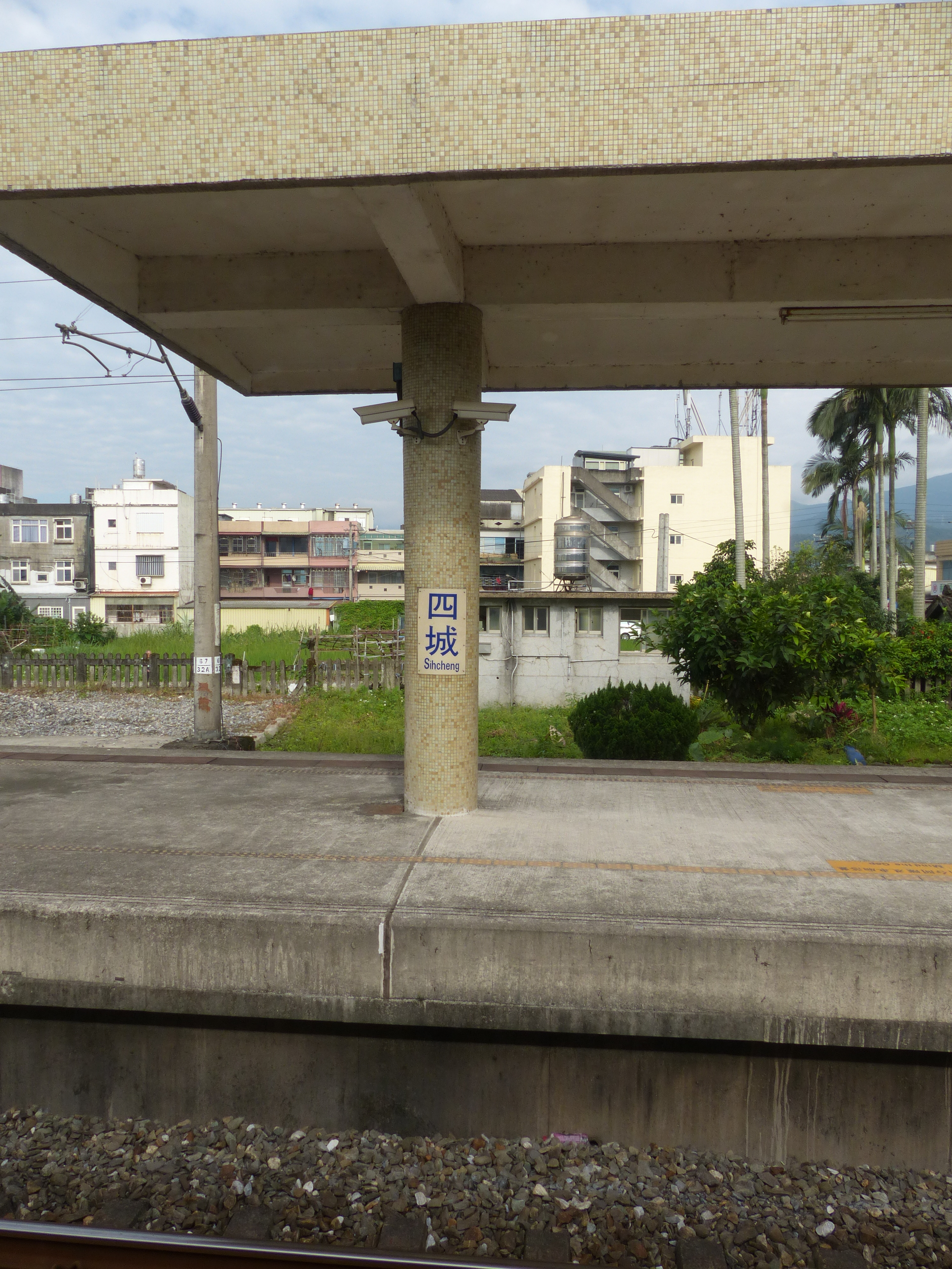 四城車站第一月臺的雨棚樑柱與監視攝影機。